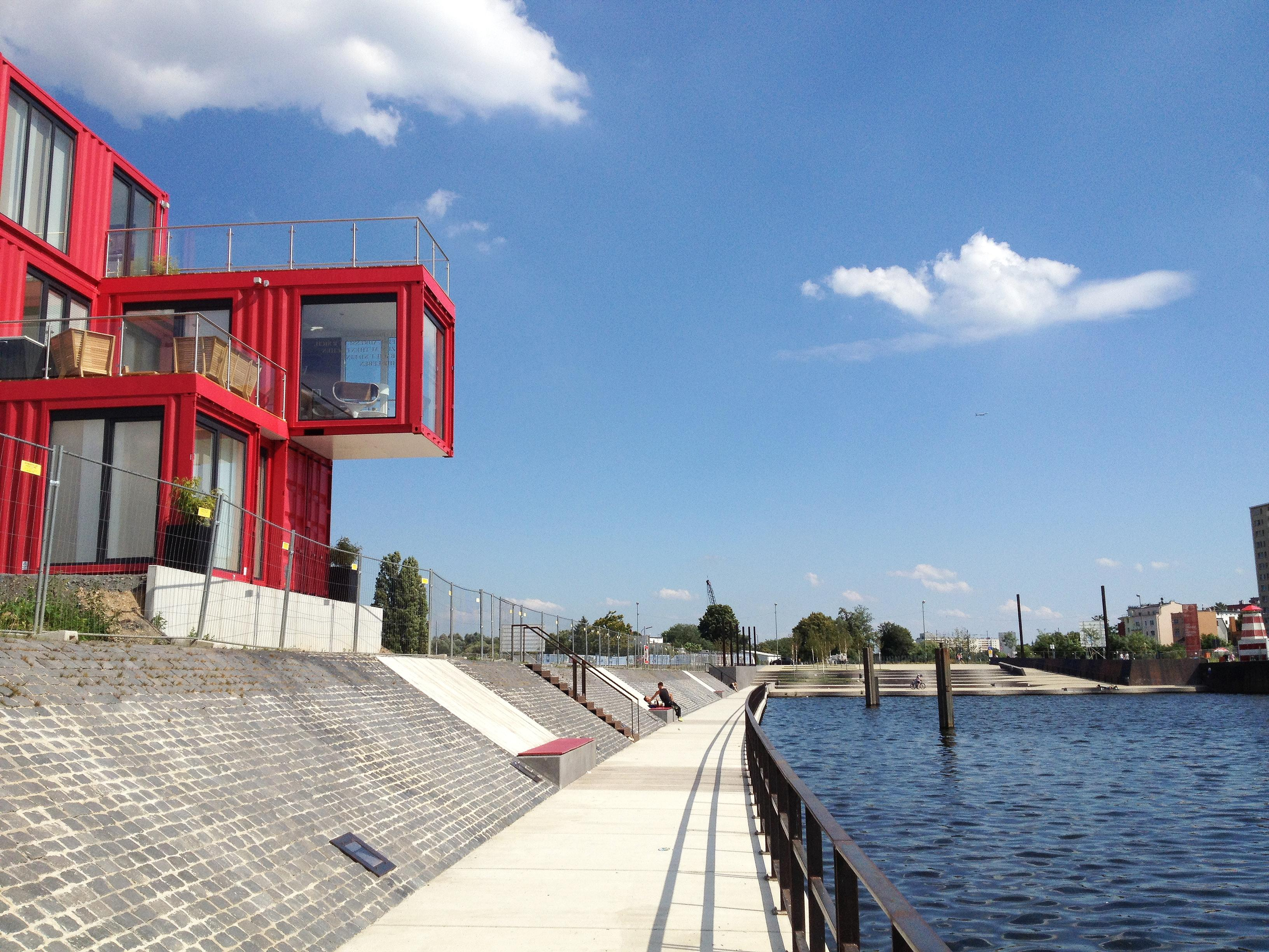 Hafen Offenbach mit Hafentreppe; Links: Promenade und Infostand der Deutsche Wohnwerte